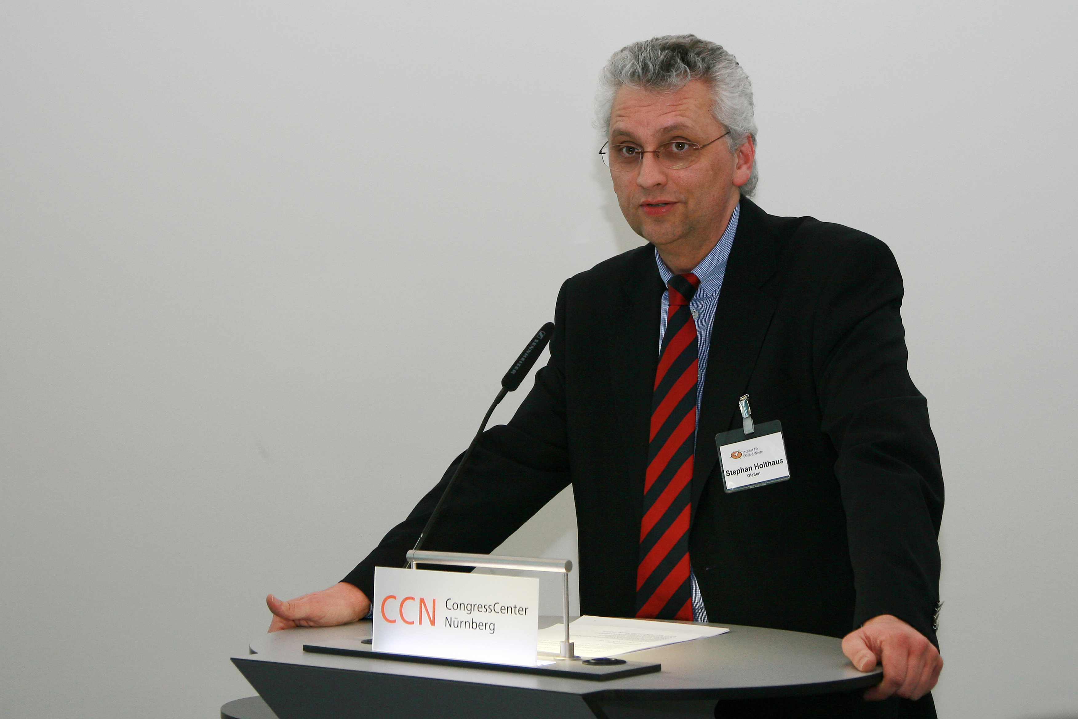 Stephan Holthaus, evangelischer Theologe, Leiter des Instituts für Ethik und Werte in Gießen, auf dem Kongress christlicher Führungskräfte 2011 in Nürnberg